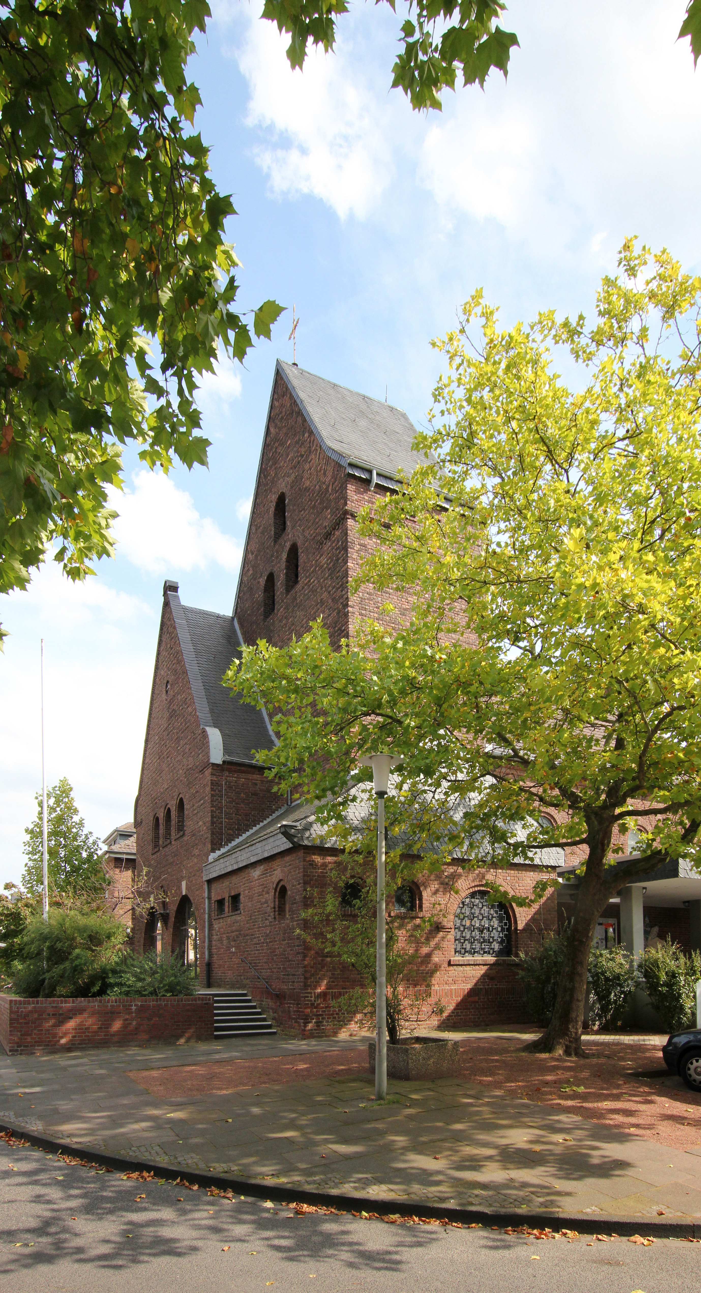 Erftstadt-Köttingen, Pfarrkirche St. Josef